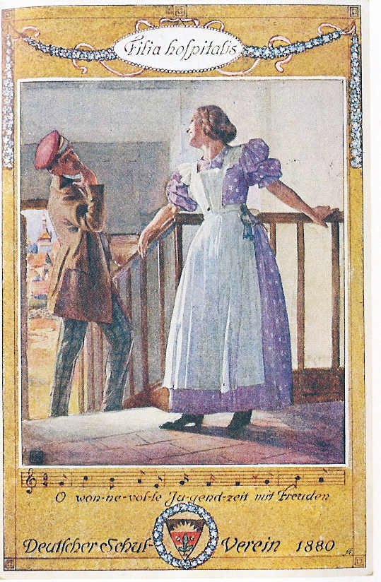 Bildpostkarte Deutscher Schul-Verein von 1880, Romantisierende bildliche Umsetzung des Studentenliedes "O wonnevolle Jugendzeit", auch bekannt als "Filia Hospitalis", Rechte abgelaufen, Public Domain